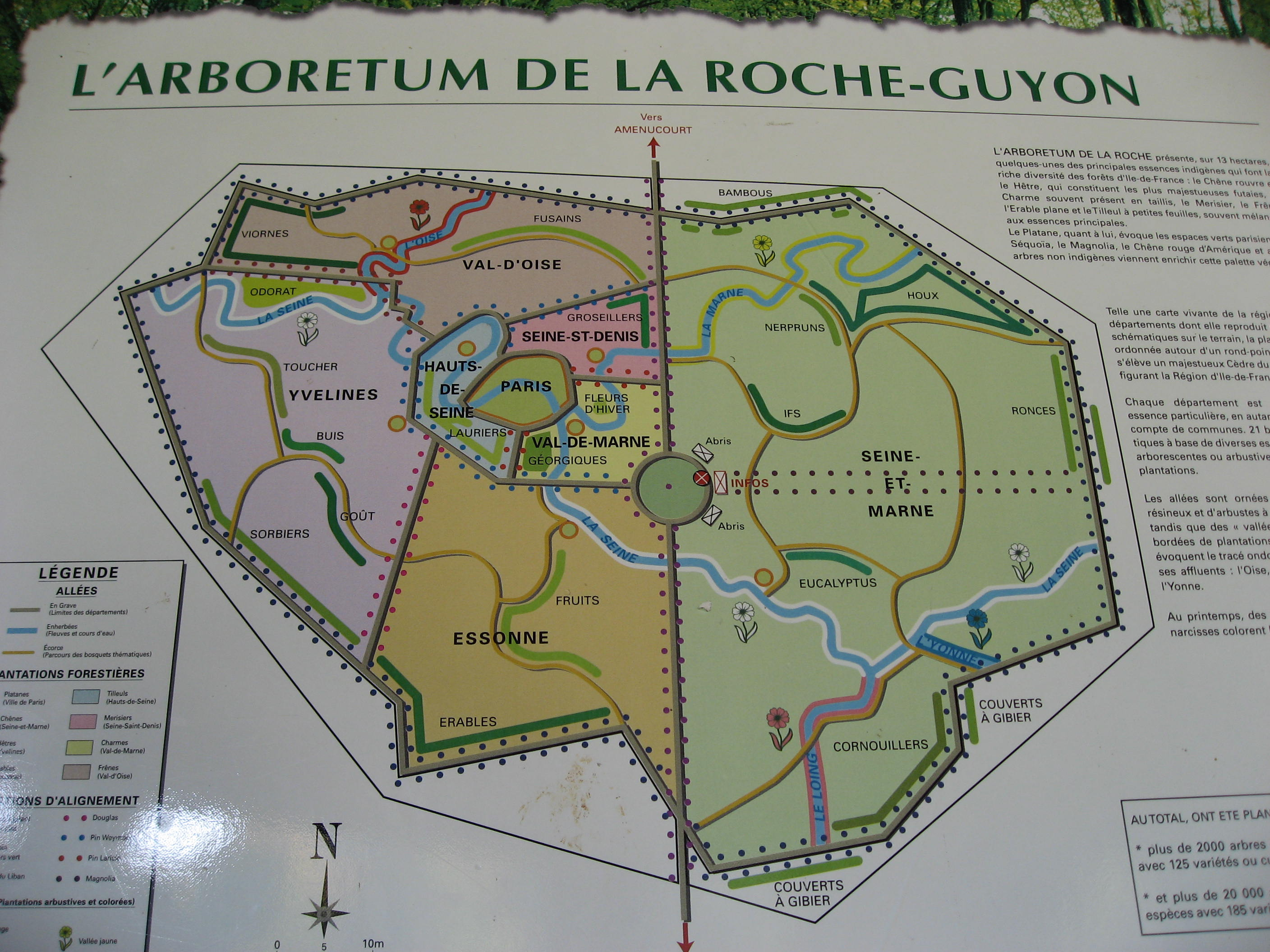 Plan explicatif de l'Arboretum de La Roche-Guyon Map: 49° 5' 56" N 1° 38' 23" E